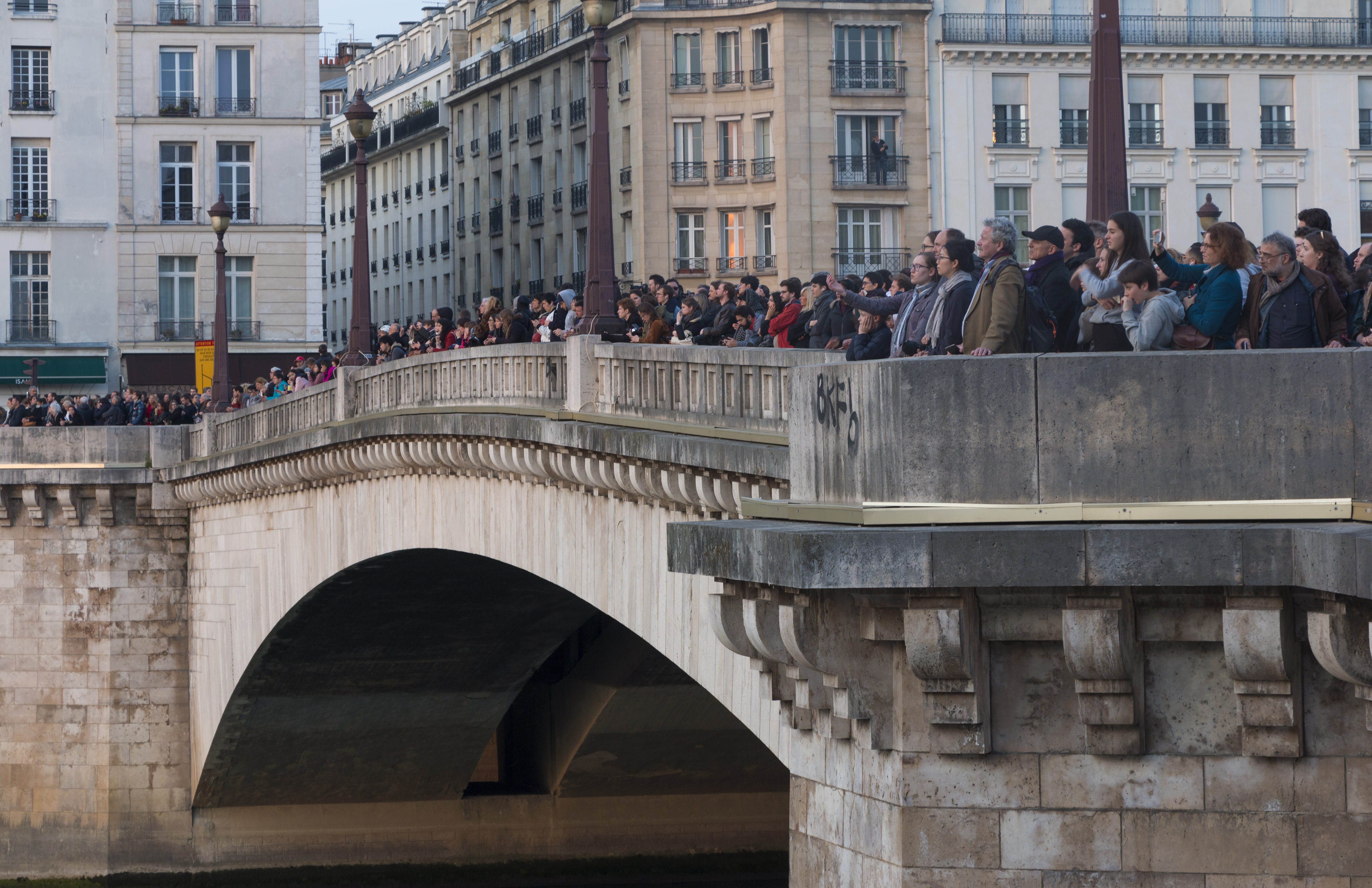 La foule assiste en silence à l'incendie de la cathédrale Notre-Dame de Paris depuis le Pont de la Tournelle